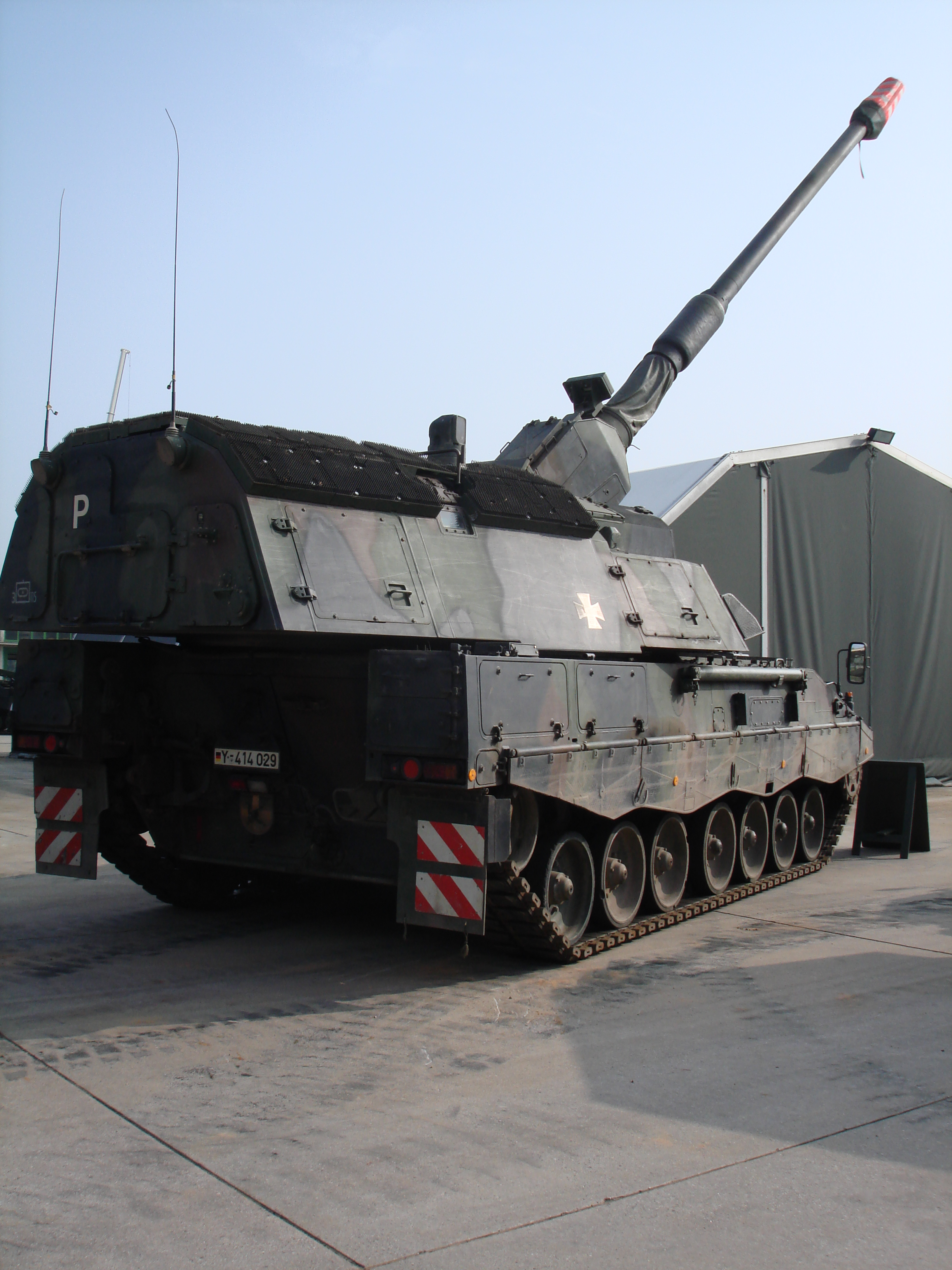 Panzerhaubitze 2000 beim Tag der offenen Tür der Wehrtechnische Dienststelle für Kraftfahrzeuge und Panzer (WTD 41) in Trier. Auf dem Turm wurde der Igel-Dachschutz angebracht. Ebenfalls ausgefahren ist das Kommandanten Periskop PERI-RTNL 80